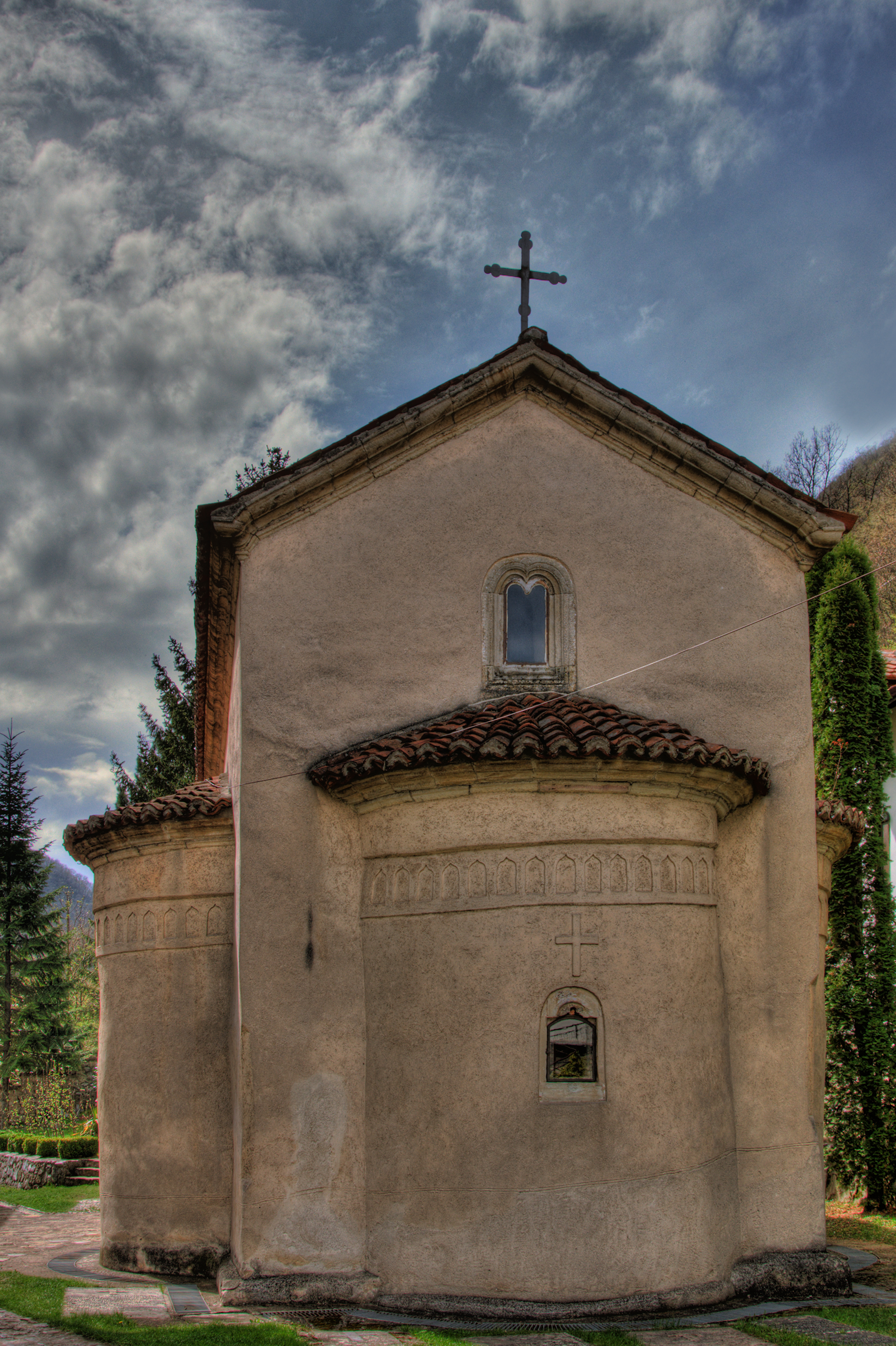 Manastir Nikolje